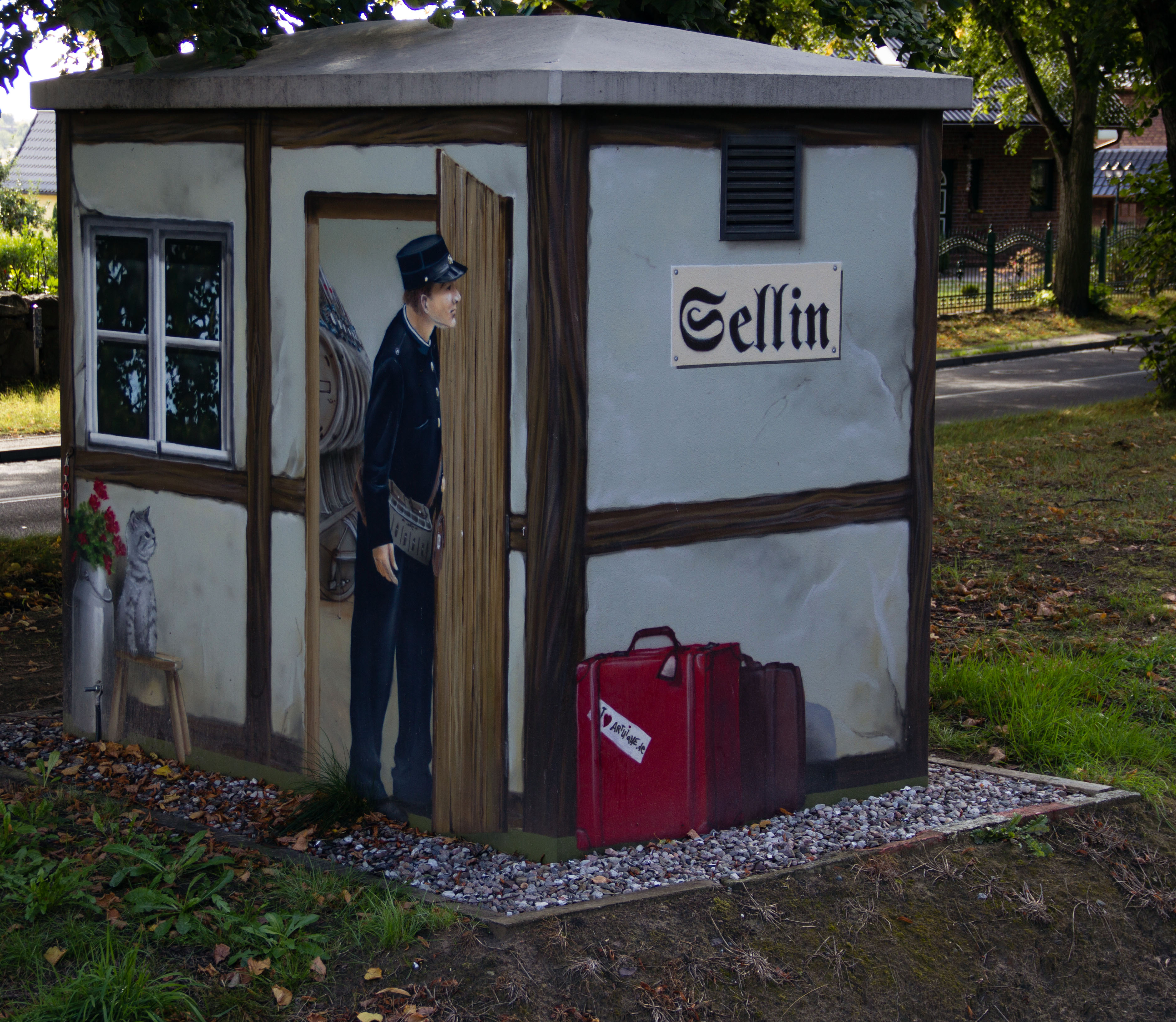 Sellin, nahe Ostbahnhof